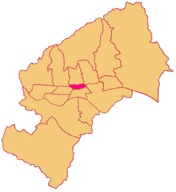 Map of Donji grad District in Zagreb (Gradska četvrt Donji grad)